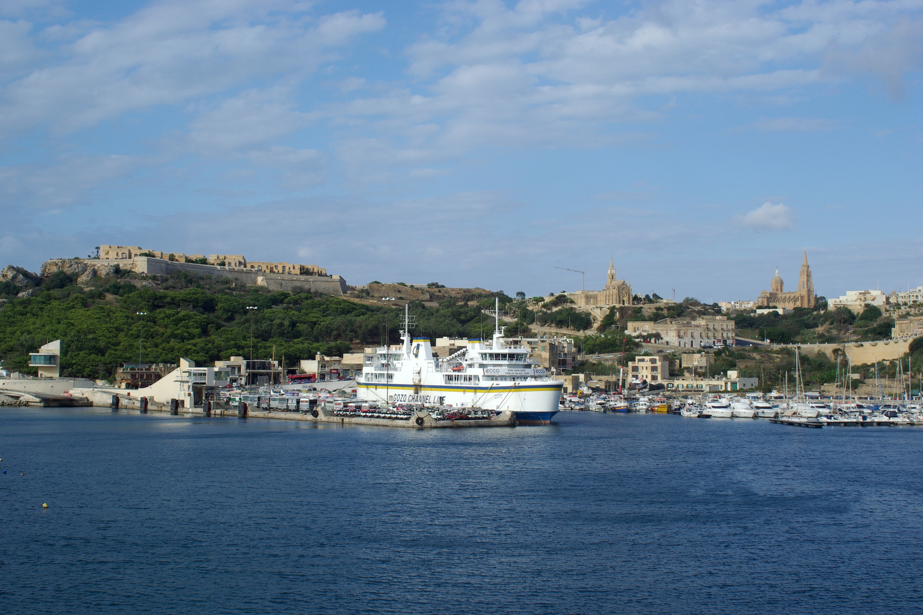 Hafen von Mgarr